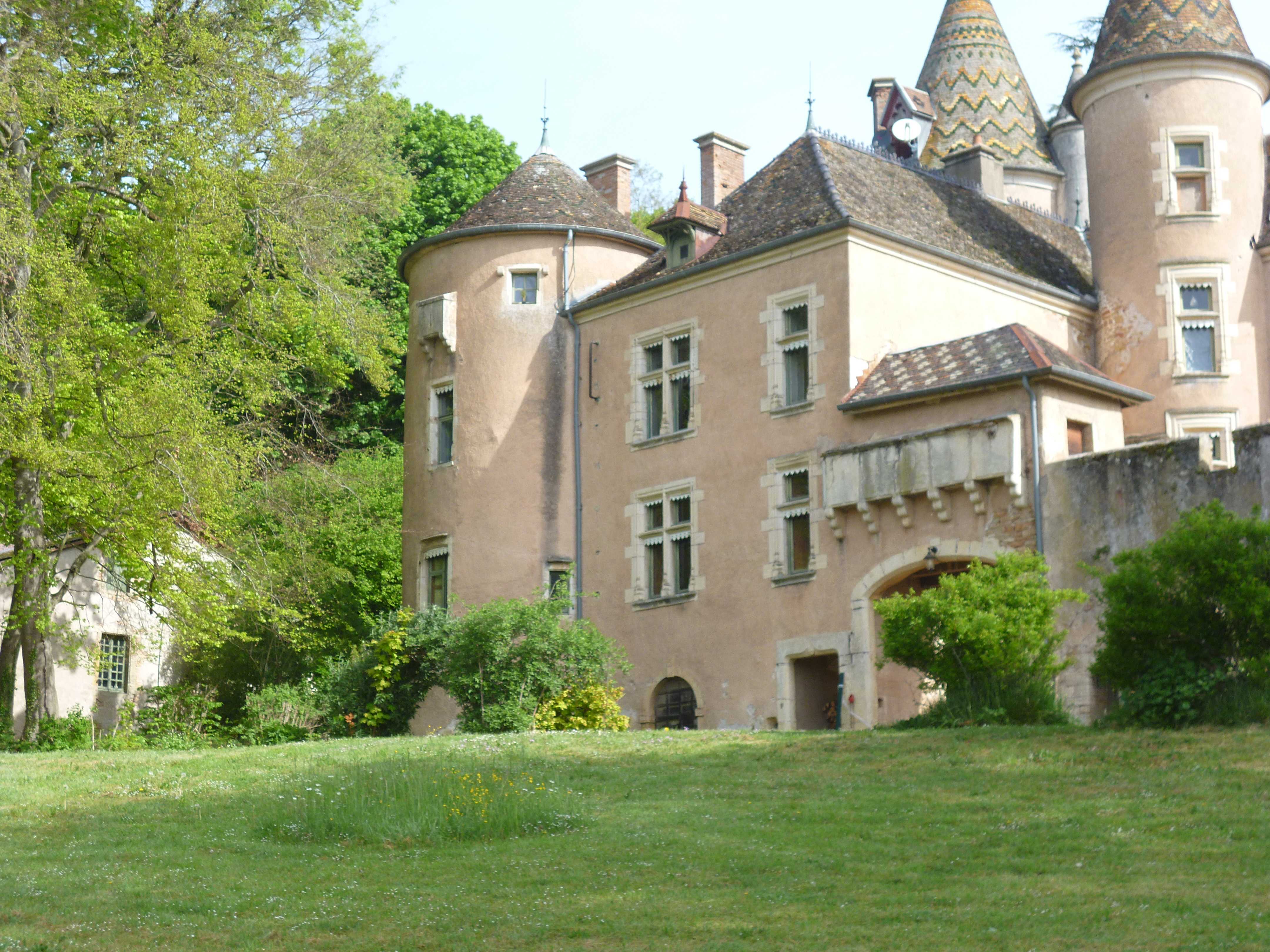 Burgundy, Loire, France